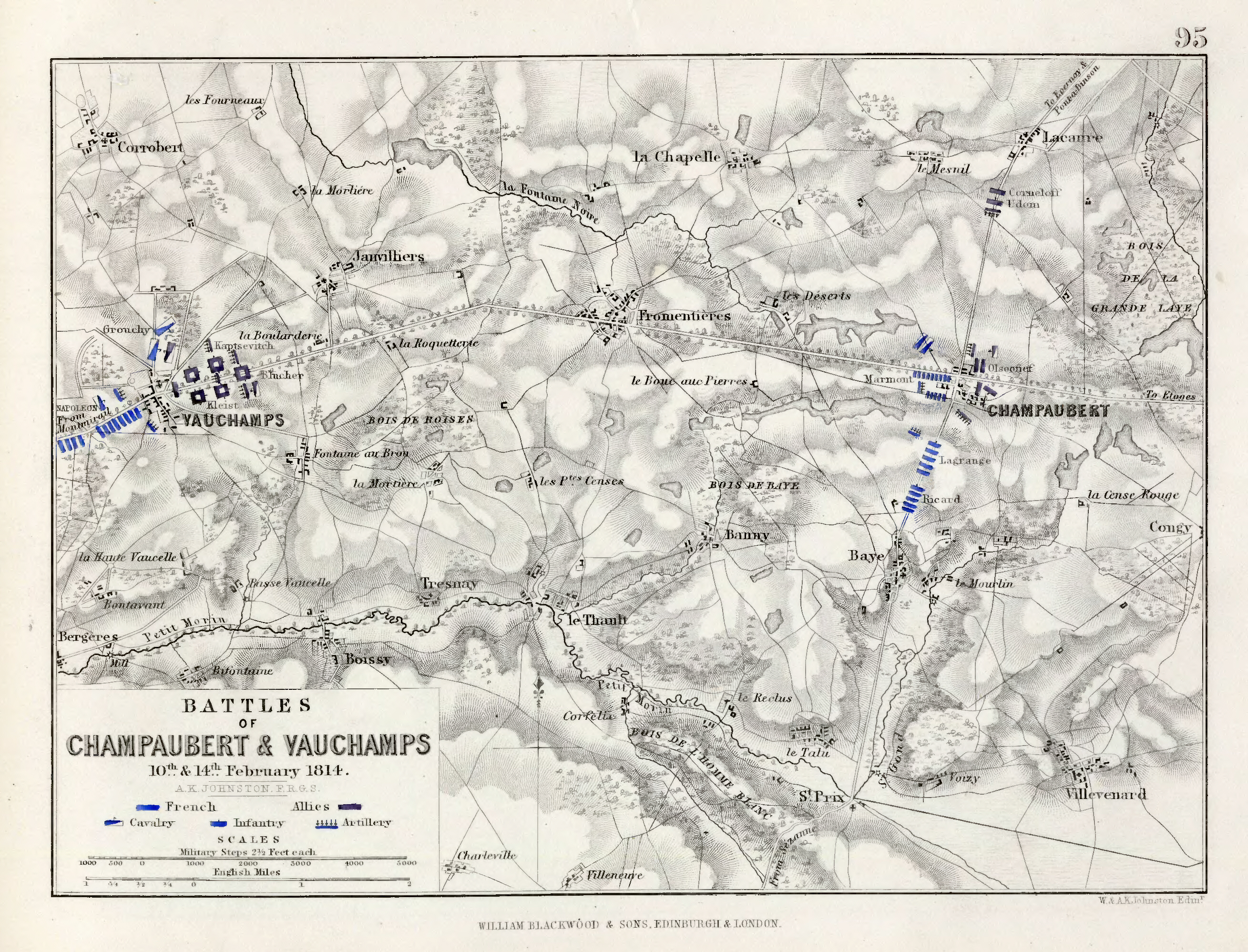 Plan der Schlacht bei Champaubert am 10.02.1814 und bei Vauchamps am 14.02.1814